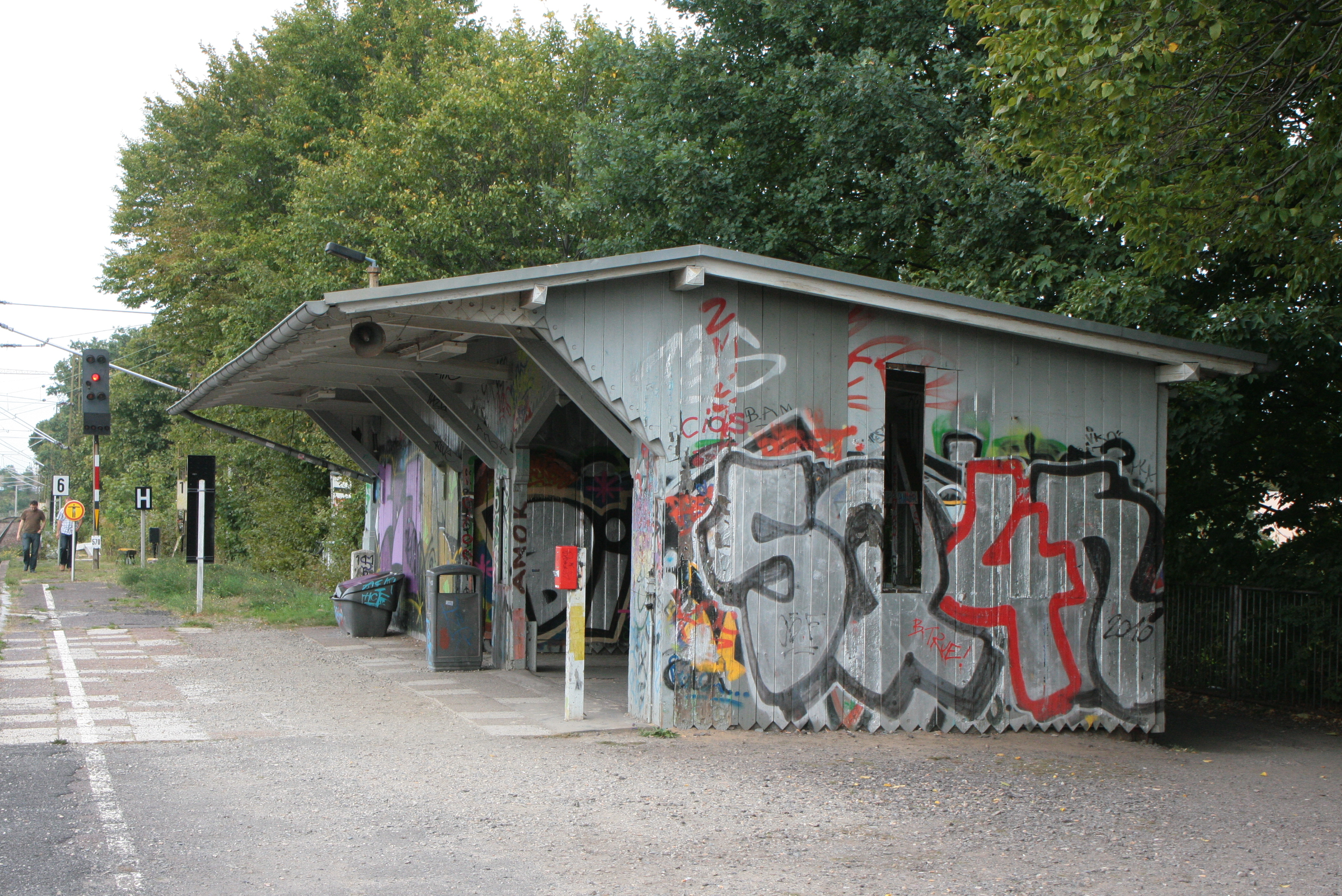 ehemalige Wartehalle des Haltepunkts Dresden-Trachau am damaligen Außenbahnsteig Richtung Coswig; zwischenzeitlich wegen des viergleisigen Streckenausbaus und des damit einhergehenden Neubaus der Bahnsteiganlagen (Inselbahnsteig zwischen den S-Bahn-Gleisen) abgerissen.